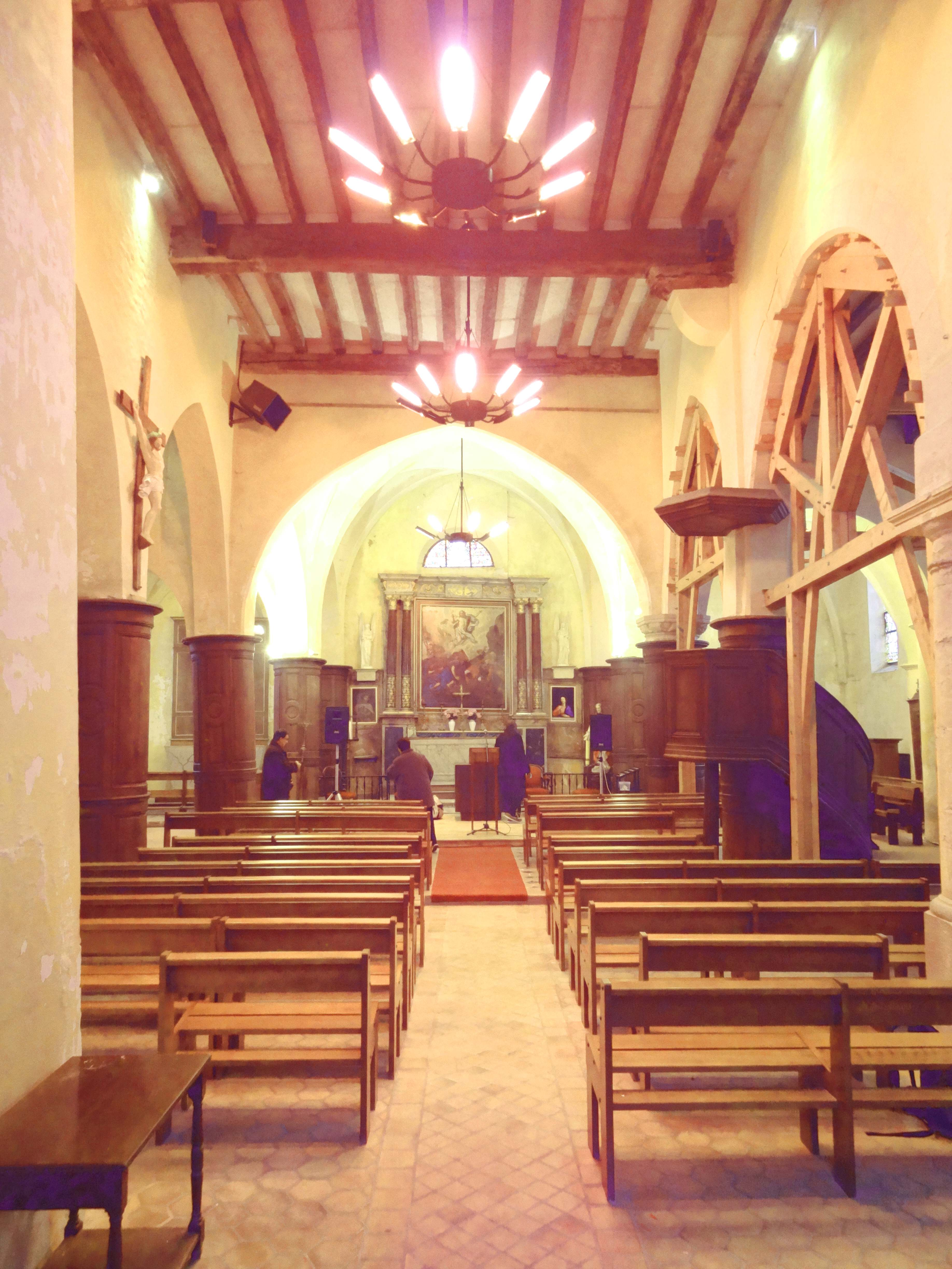 Intérieur de l'église - voir titre.